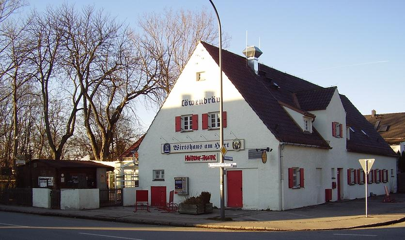 Hinterhoftheater in München (Munich / Germany)